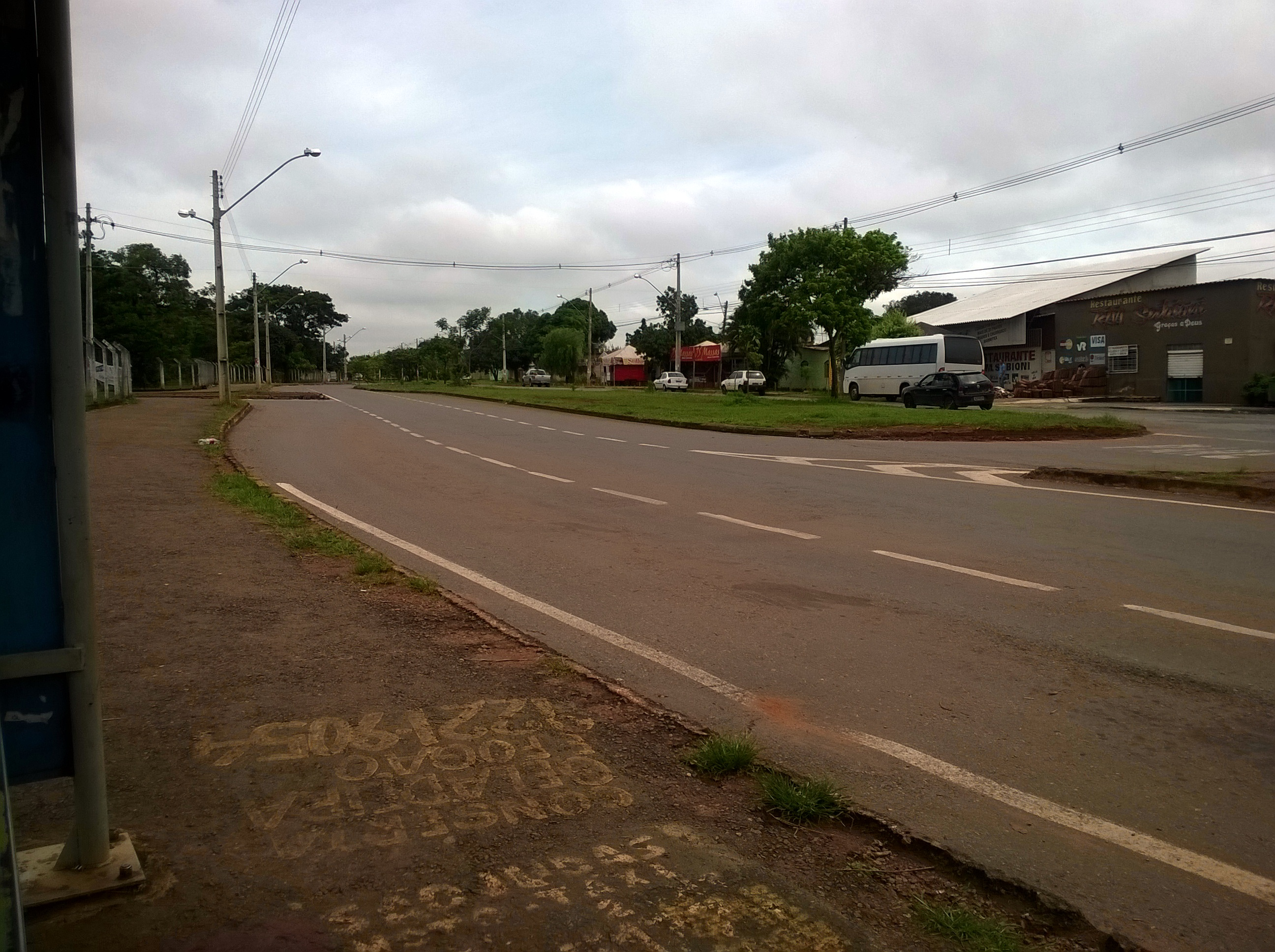 Avenida no bairro Itatiaia, área da UFG, em março de 2015.